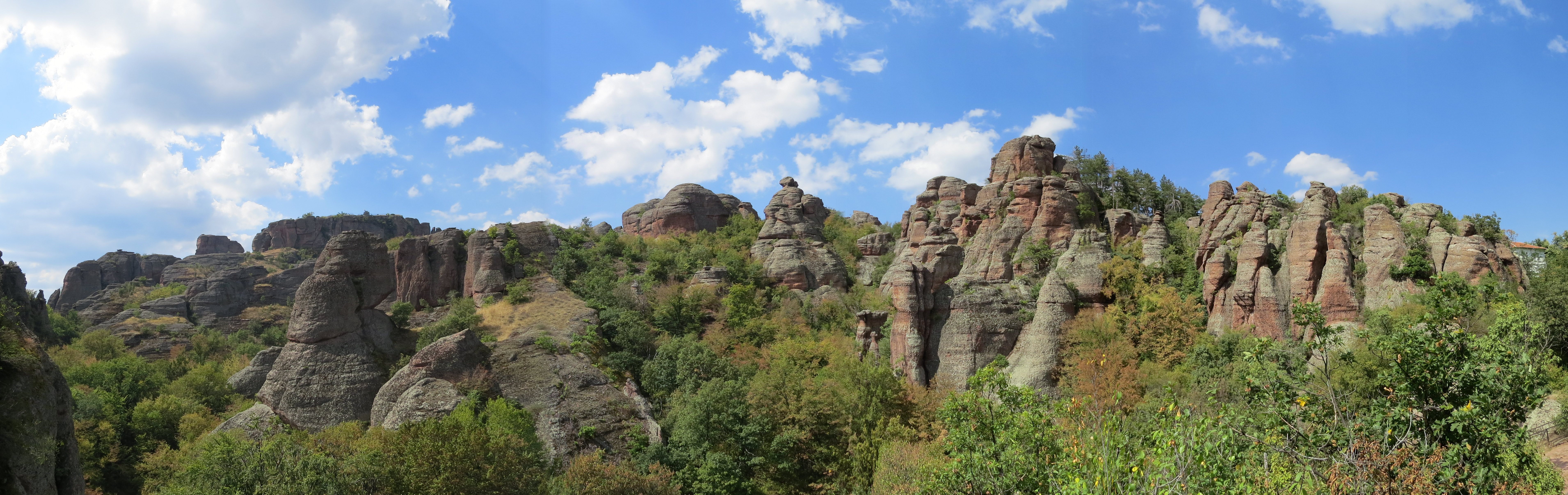 Skalne stene v Belogradčiku, severovzhodna Bolgarija.